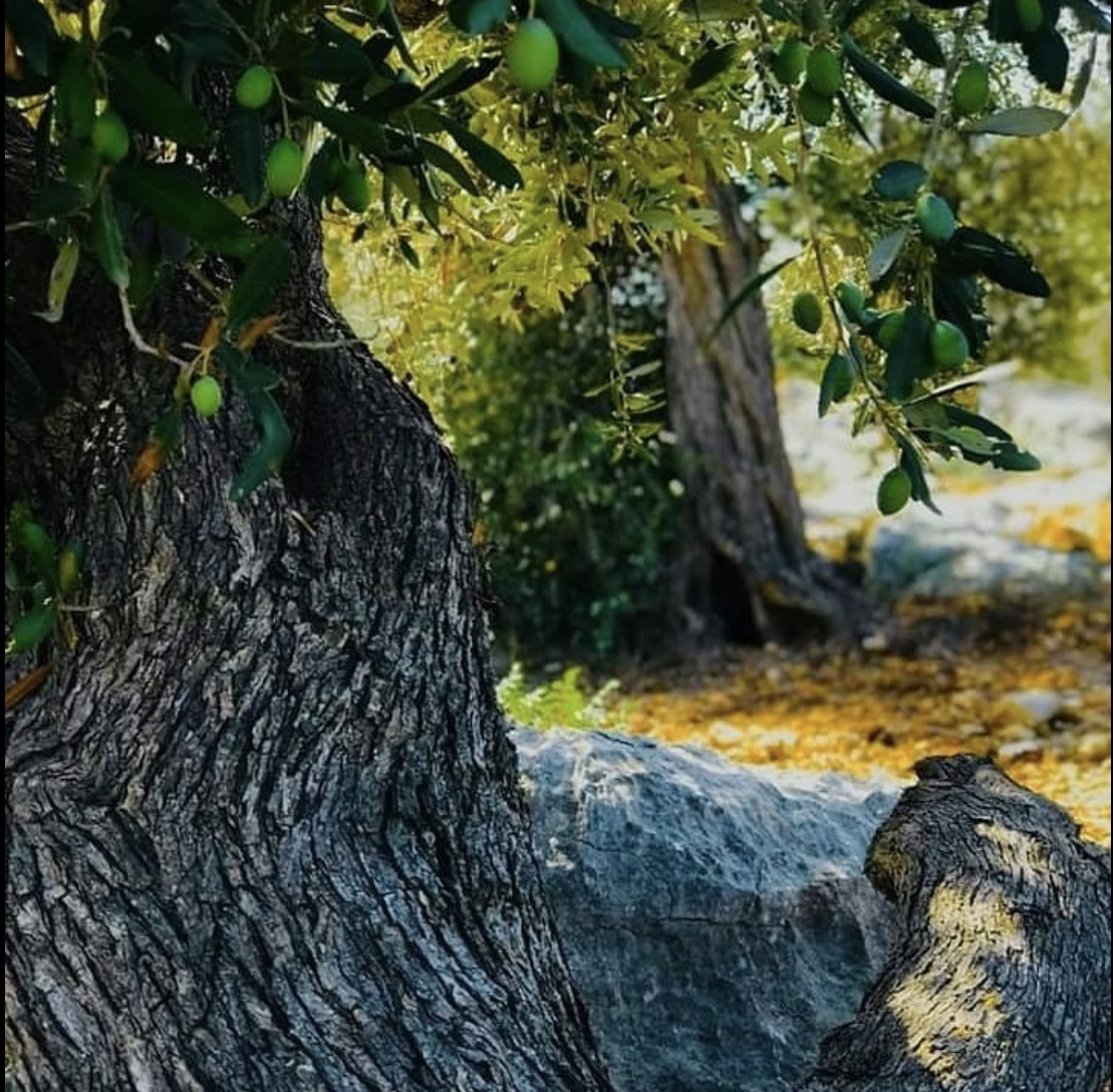 الصورة تظهر اشجار الزيتون المباركة في فلسطين، والتي تمثل رمزا نضاليا يعبر عن تمسكه الشعب الفلسطيني وثباته في أرضه